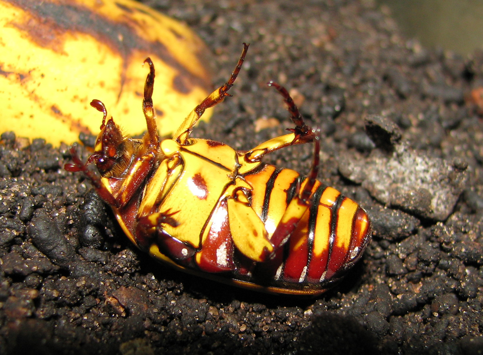 Pachnoda sinuata from ventral